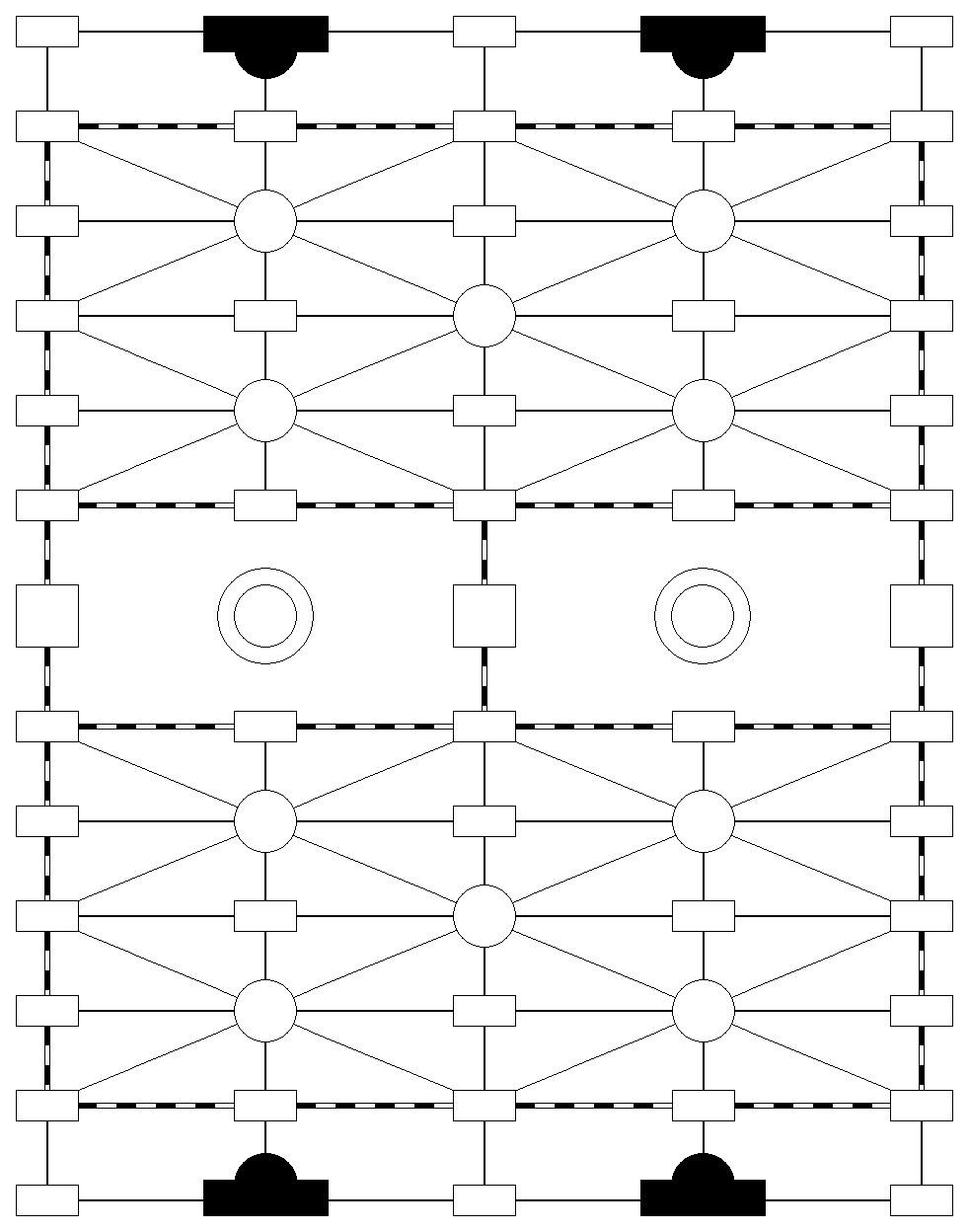 Esquema del tablero usado en el juego chino Luzhanqi.